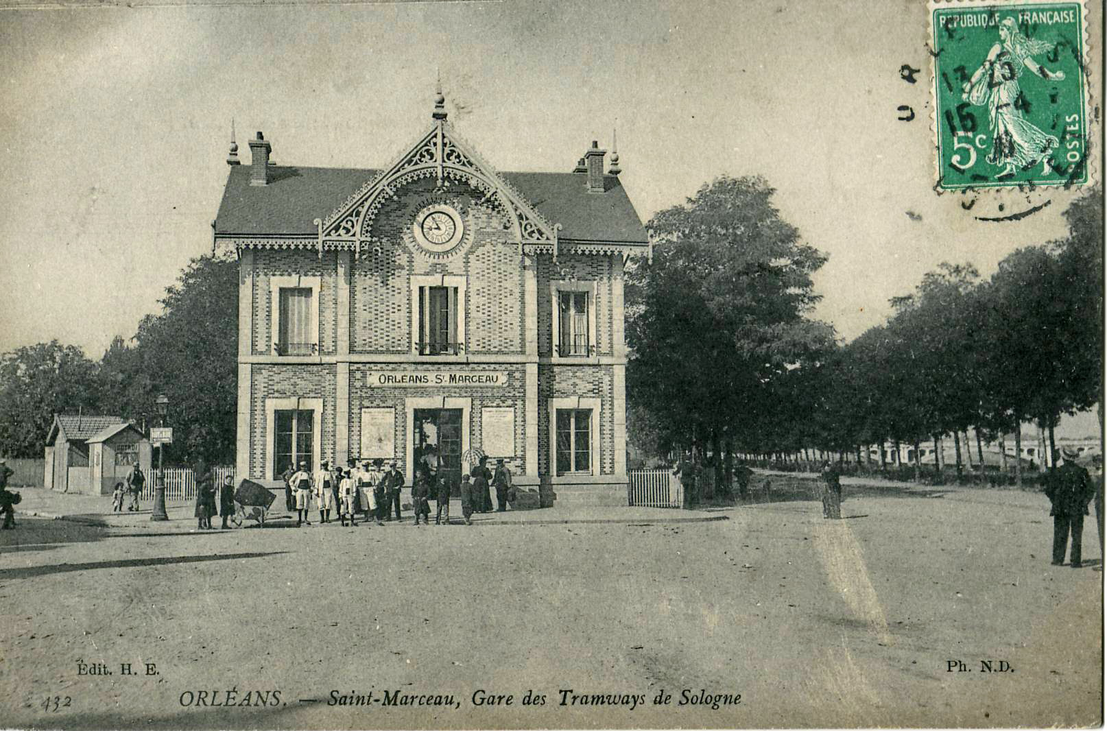 Carte postale ancienne éditée par H. E. (photo N. D.) n°432 :ORLÉANS - Saint-Marceau, gare des Tramways de Sologne